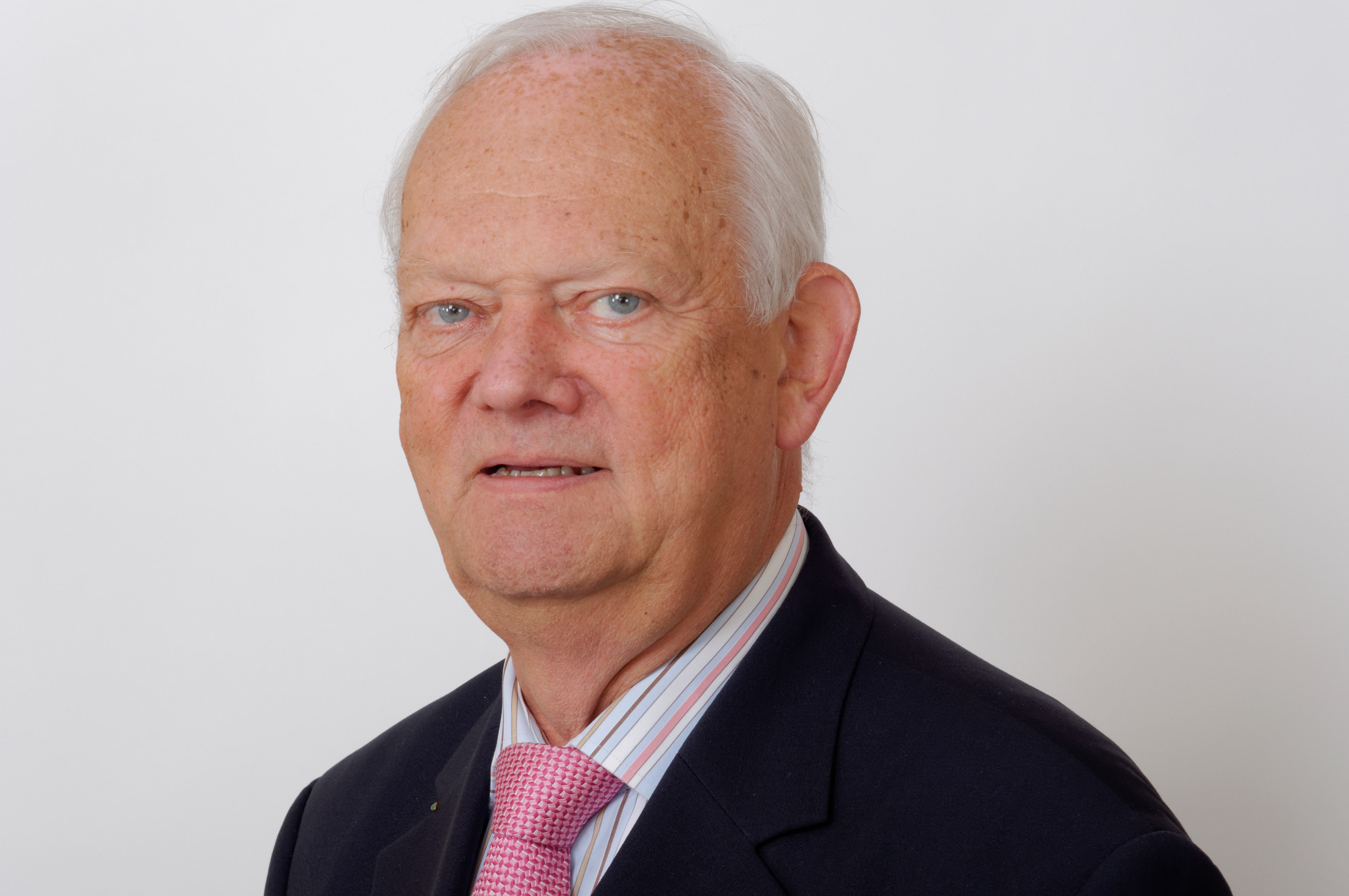 Landtagsprojekt Hessen